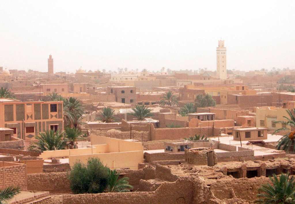 Figuig